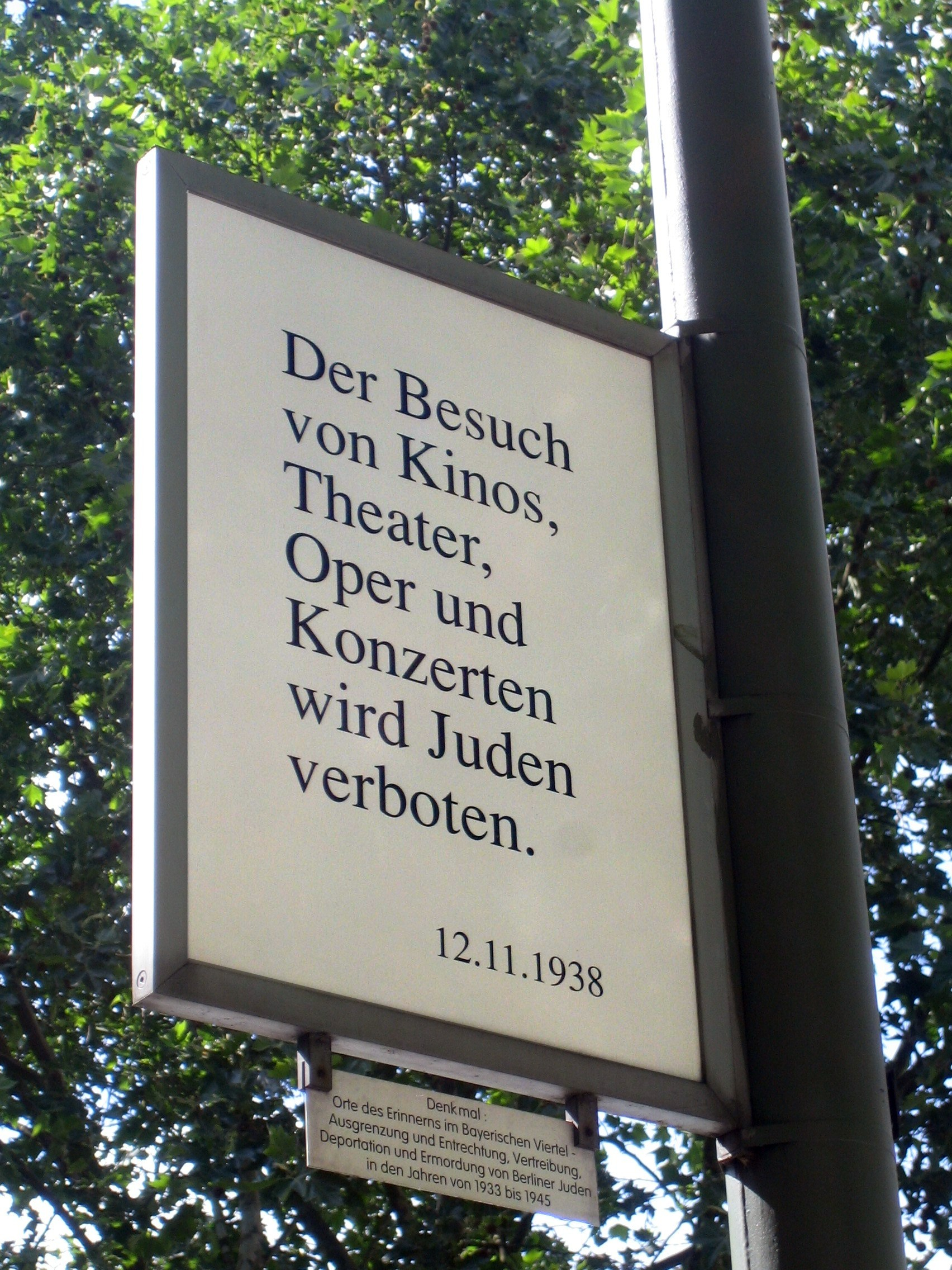 Berlin-Schöneberg, Bayerisches Viertel. Denkmal zur Erinnerung an die Unterdrückung der Juden 1933-1945. Tafel zum Verbot von Kino- und Theaterbesuchen auf Höhe der Barbarossastraße 36a